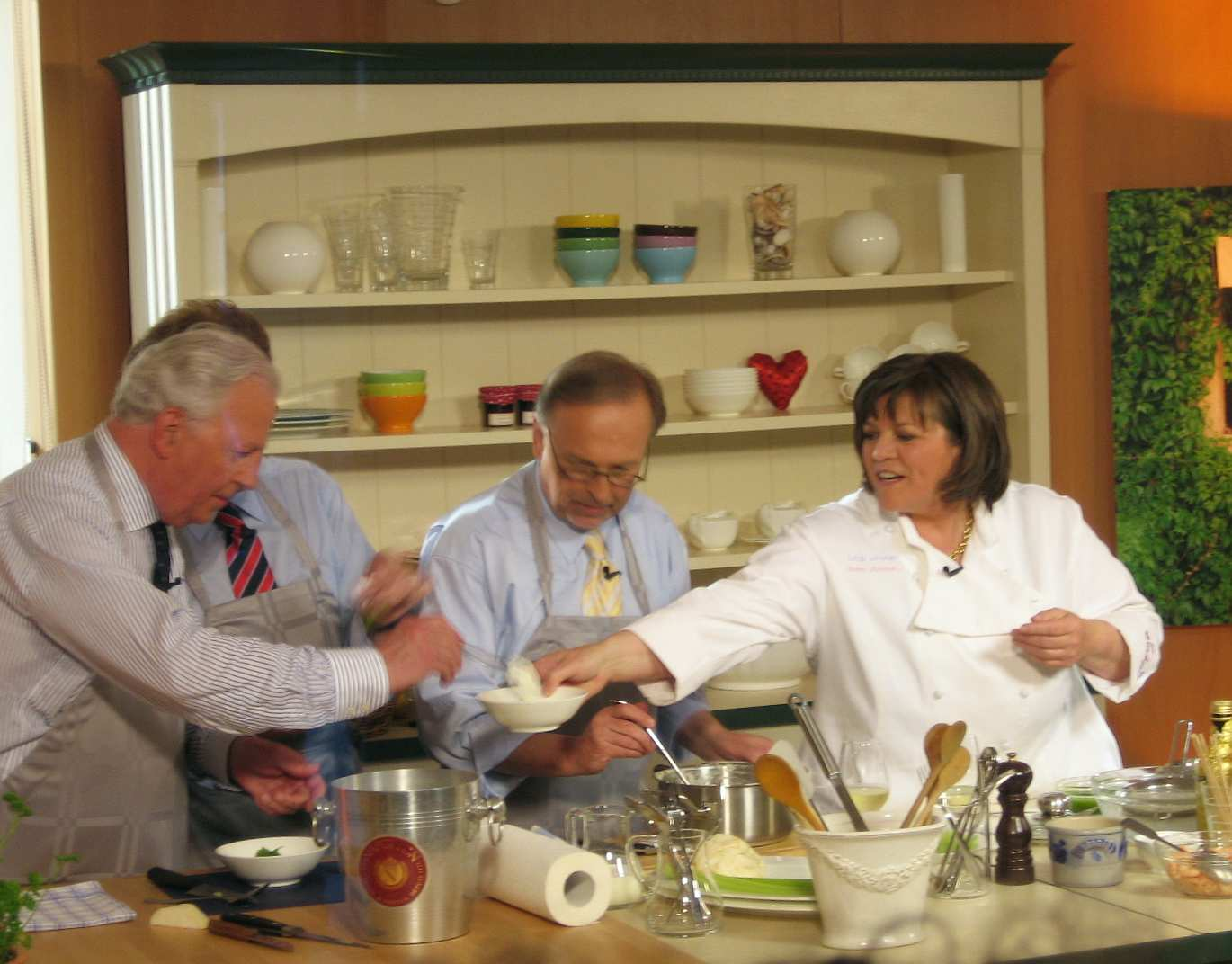 D'Léa Linster an de Jacques Santer (lénks), an der Léa Linster hirer Kacheemissioun op der Saarlännescher Tëlee (Emissioun vum 3. Mee 2007).